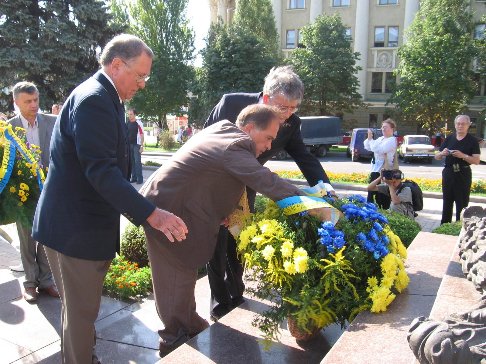 Покладання квітів: Фото